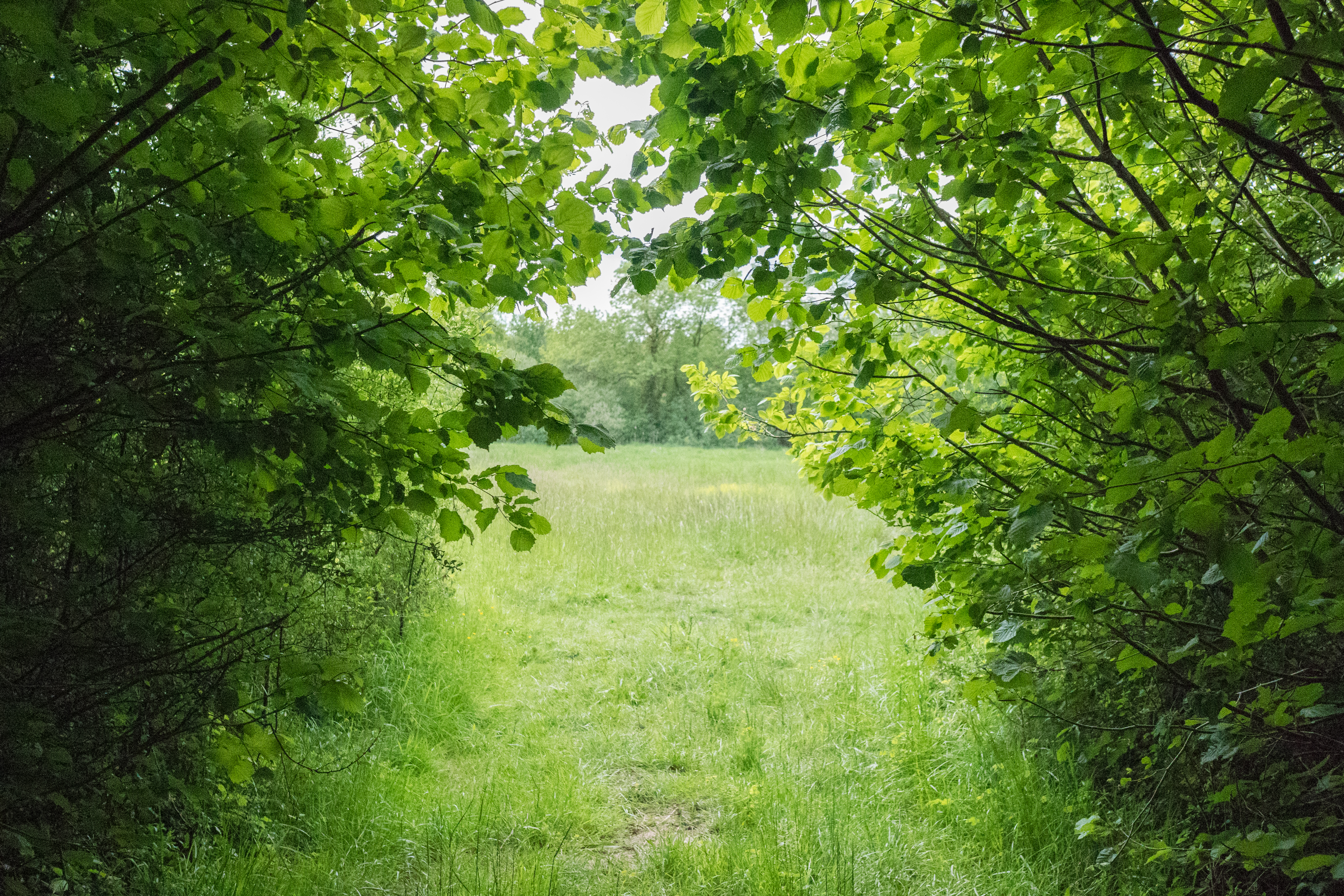 A l'orée de la forêt